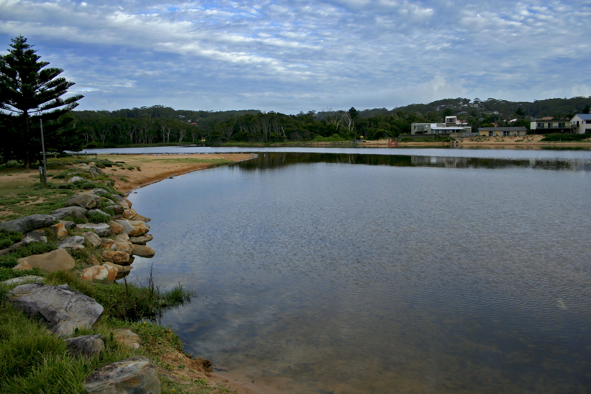 Avoca Lake